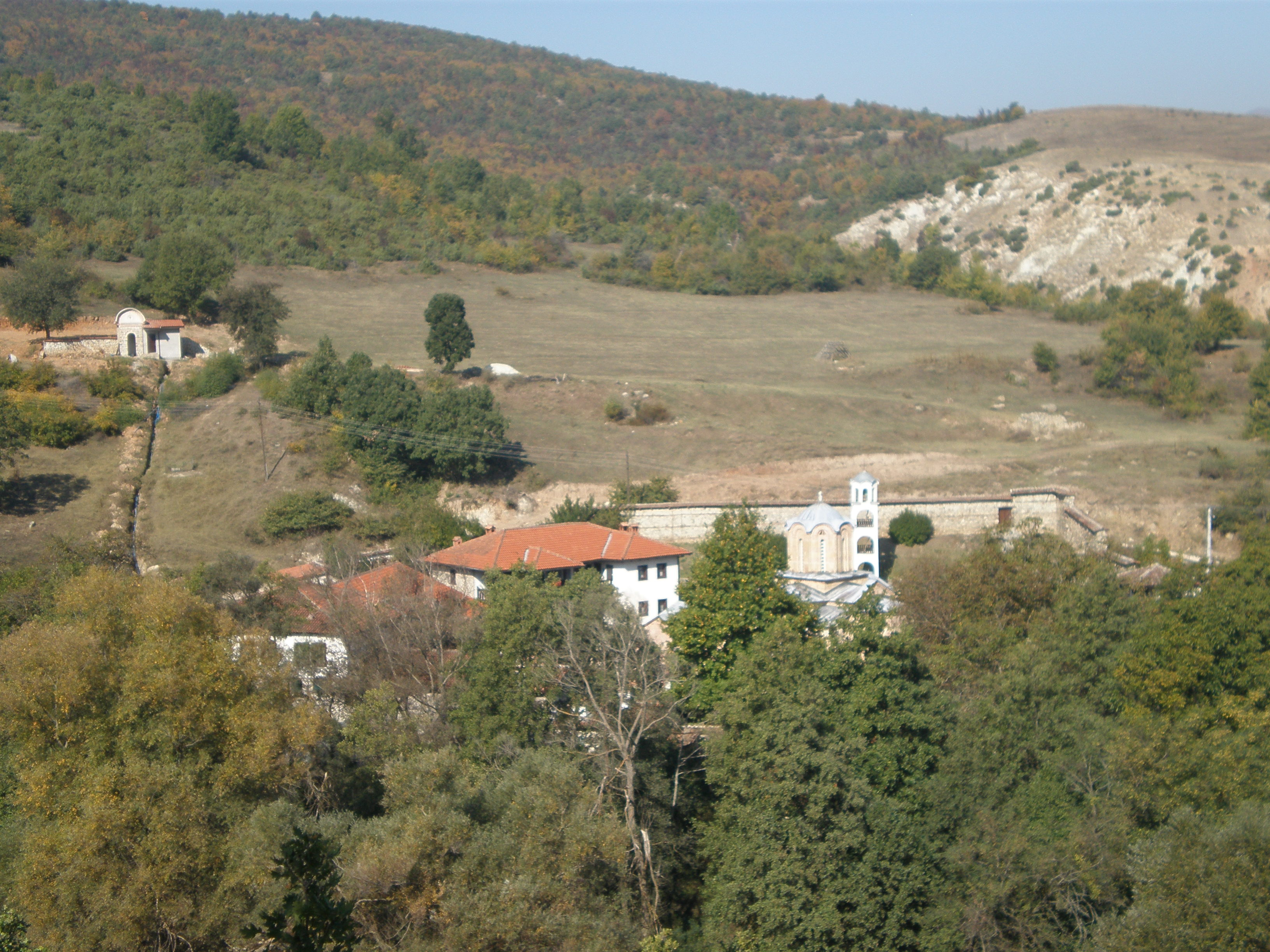 Поглед на Марковиот Манастир